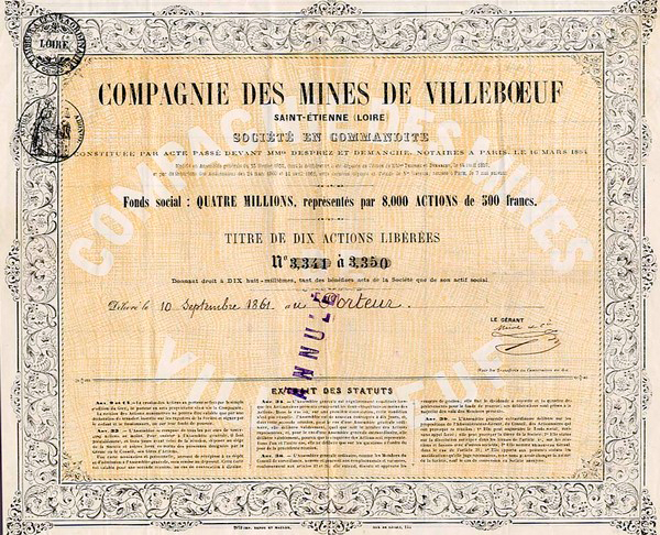 action de la Cie de mine de Villeboeuf, Saint-Etienne